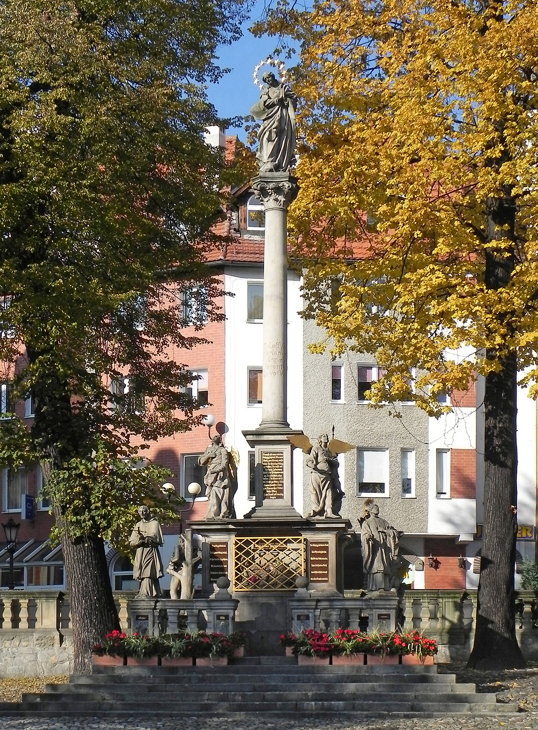 Kłodzko - kolumna z figurą Matki Boskiej, 1680 (zabytek nr 143 z 24.03.1950)